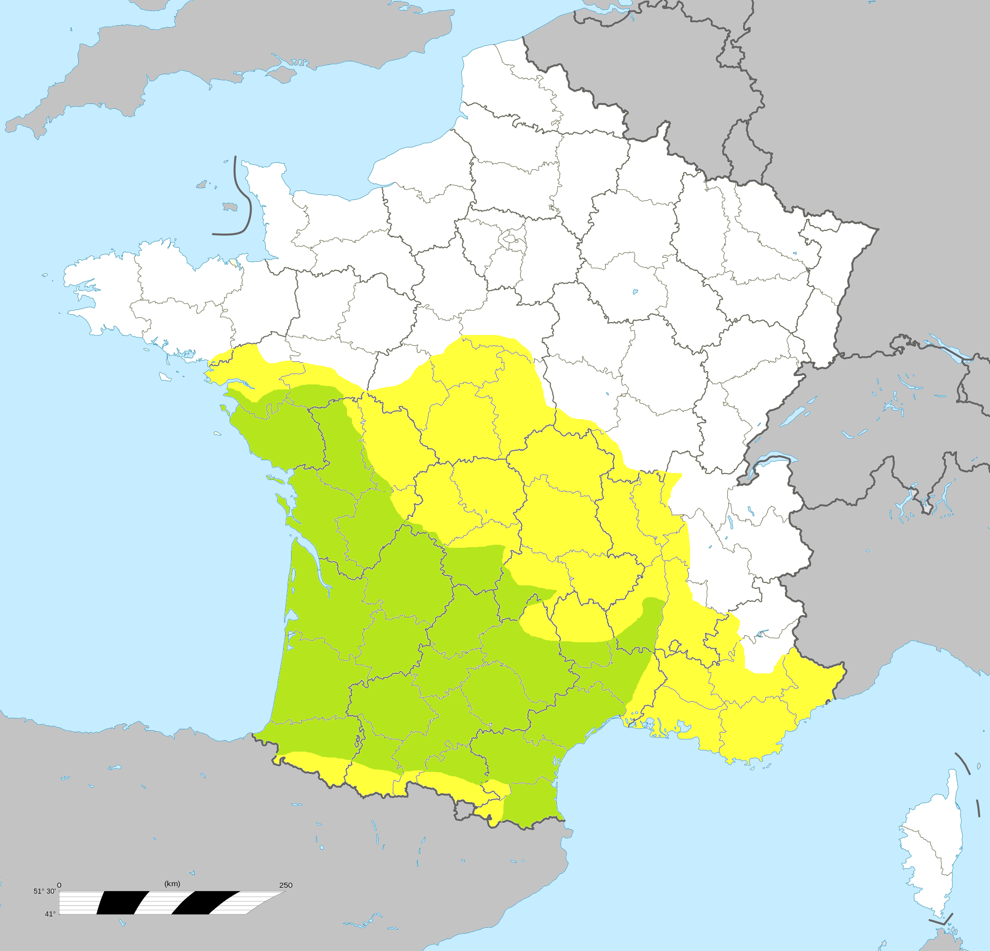 Grandes zones de la répartition géographique de la genette commune (Genetta Genetta) en France entre 1991 et 2008 : Vert : Zone de présence régulière. Jaune : Zone de présence irrégulière. Blanc : Zone avec observations diffuses. Sources : "La répartition de la genette en France" François Léger et Sandrine Ruette (ONCFS) in "Faune Sauvage numéro 287, 2010. Figure 3 : Répartition de la genette en France, période 1991-2009". Lire en ligne